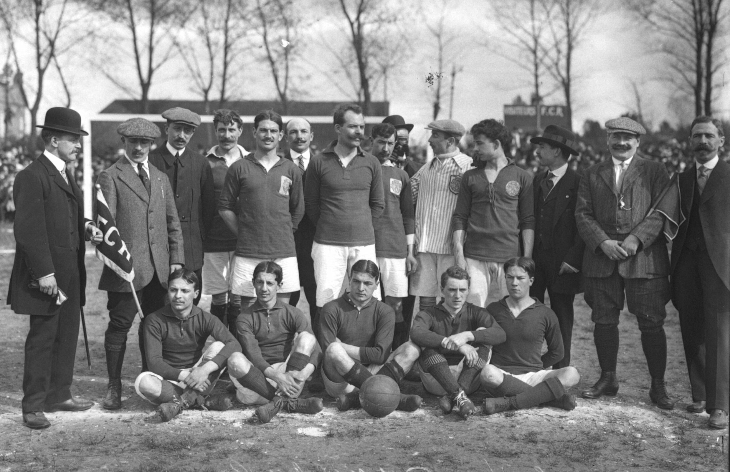 Photo de l'équipe de football du FC Rouen de 1913. Figurent notamment Robert Diochon (président, à gauche), Adam Ferris (capitaine, 4e depuis la gauche) et Maurice Cousinard (gardien de but, maillot clair).